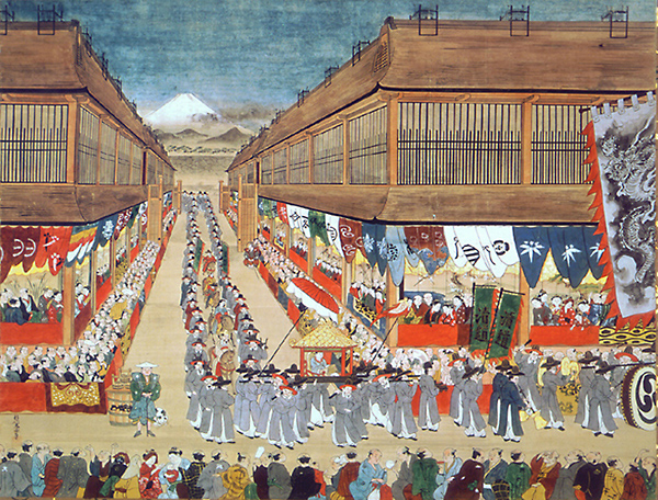 Процесія корейського посольства в японському місті